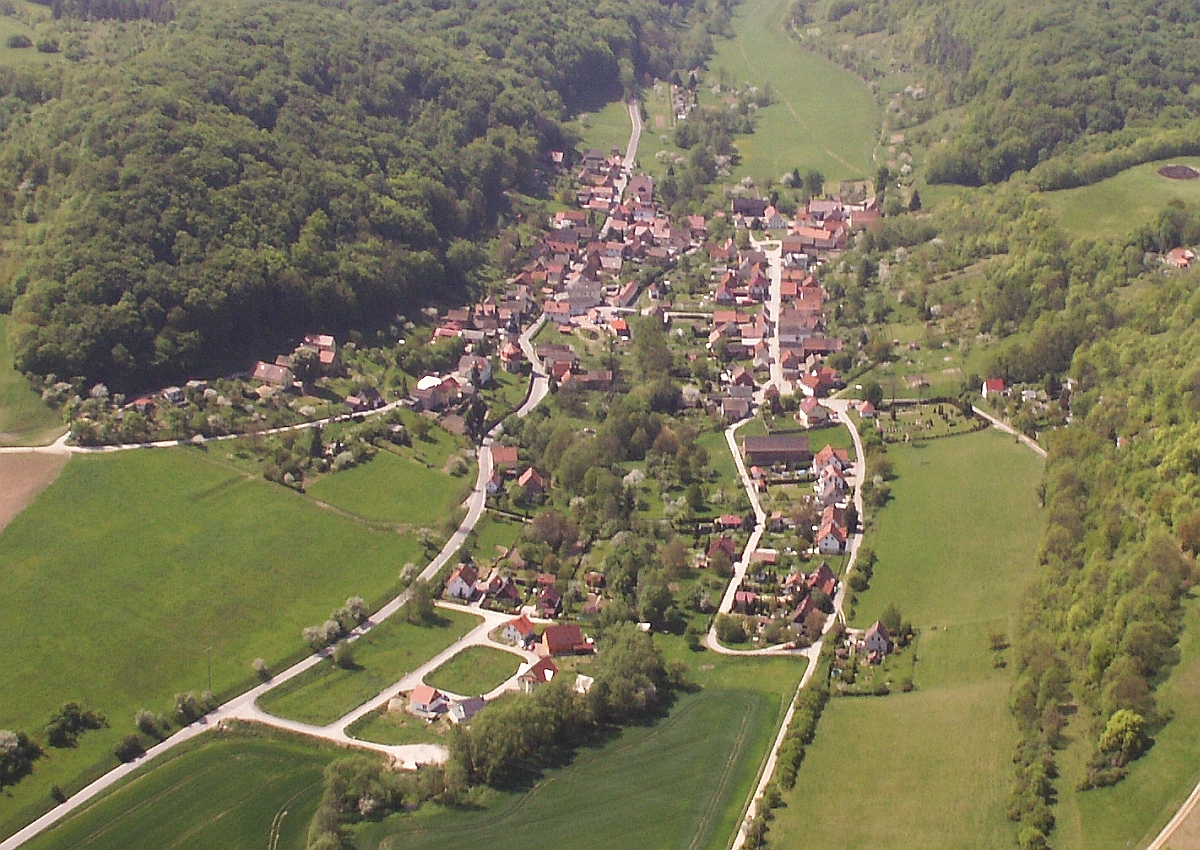 Neuengönna Luftbild Saaletal Thüringen Foto 2006 Wolfgang Pehlemann Wiesbaden PICT0238